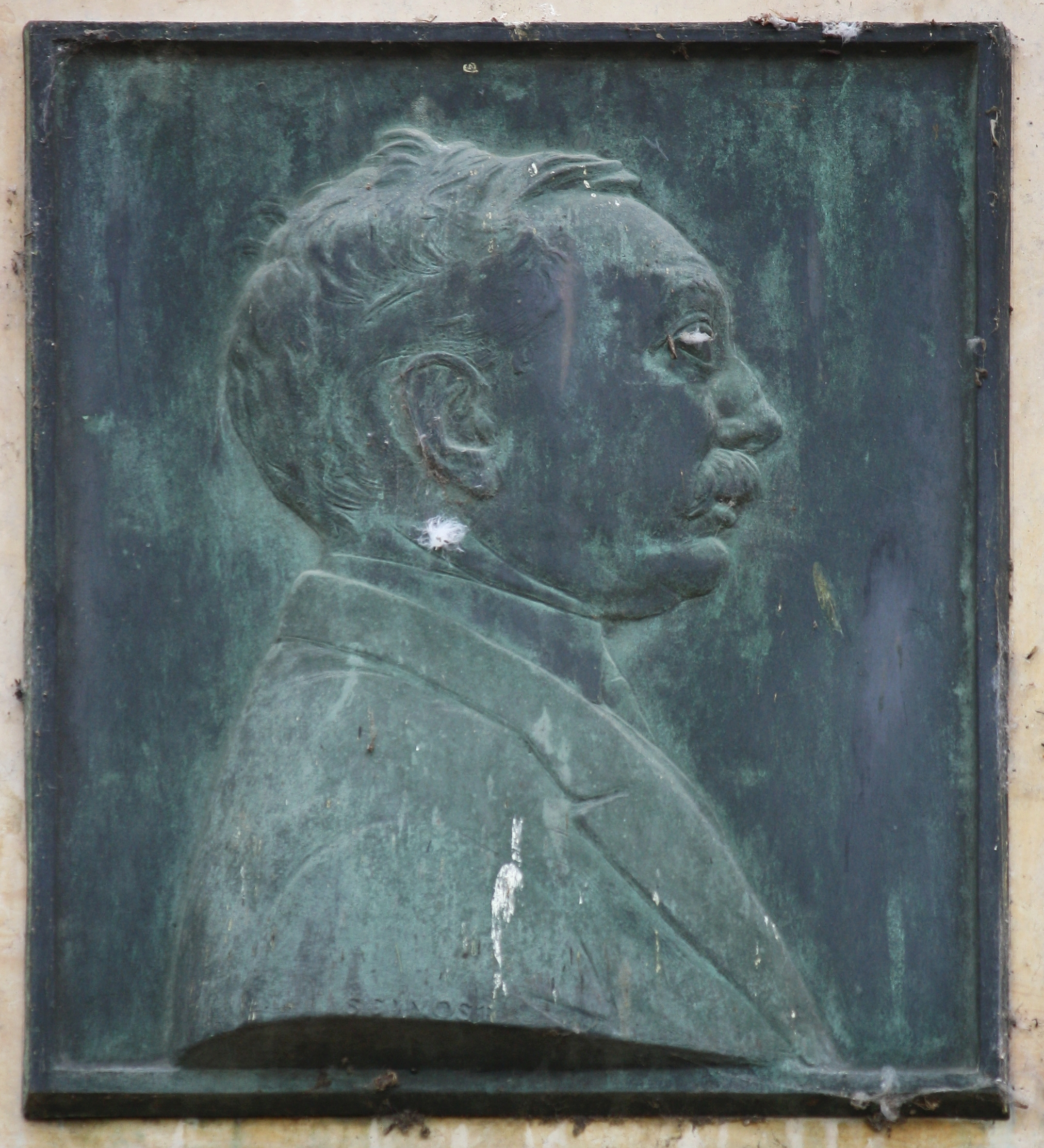 Praha, Malá Strana - Na Kampě 514/9, vltavská strana domu, Adolf Kašpar